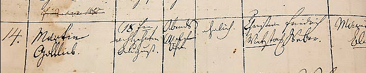 Taufeintrag von Martin Gottlieb Wittstock, dem Ururgroßvater der Fürstin Charlène von Monaco, geb. Wittstock (* 1978). Er wurde am 18. August 1840 abends in der Feldsteinkirche von Zerrenthin (Mecklenburg-Vorpommern) getauft, als ehelicher Sohn des Landarbeiters Christian Friedrich Wittstock. Eintrag Nr. 14 des Jahres 1840. Die Familie Wittstock lebte von 1807 bis 1861 im uckermärkischen Dorf Zerrenthin.